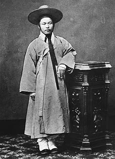 (한국어) 홍영식(洪英植)